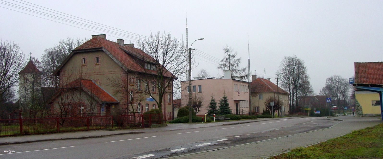 Budry. al.Wojska Polskiego.